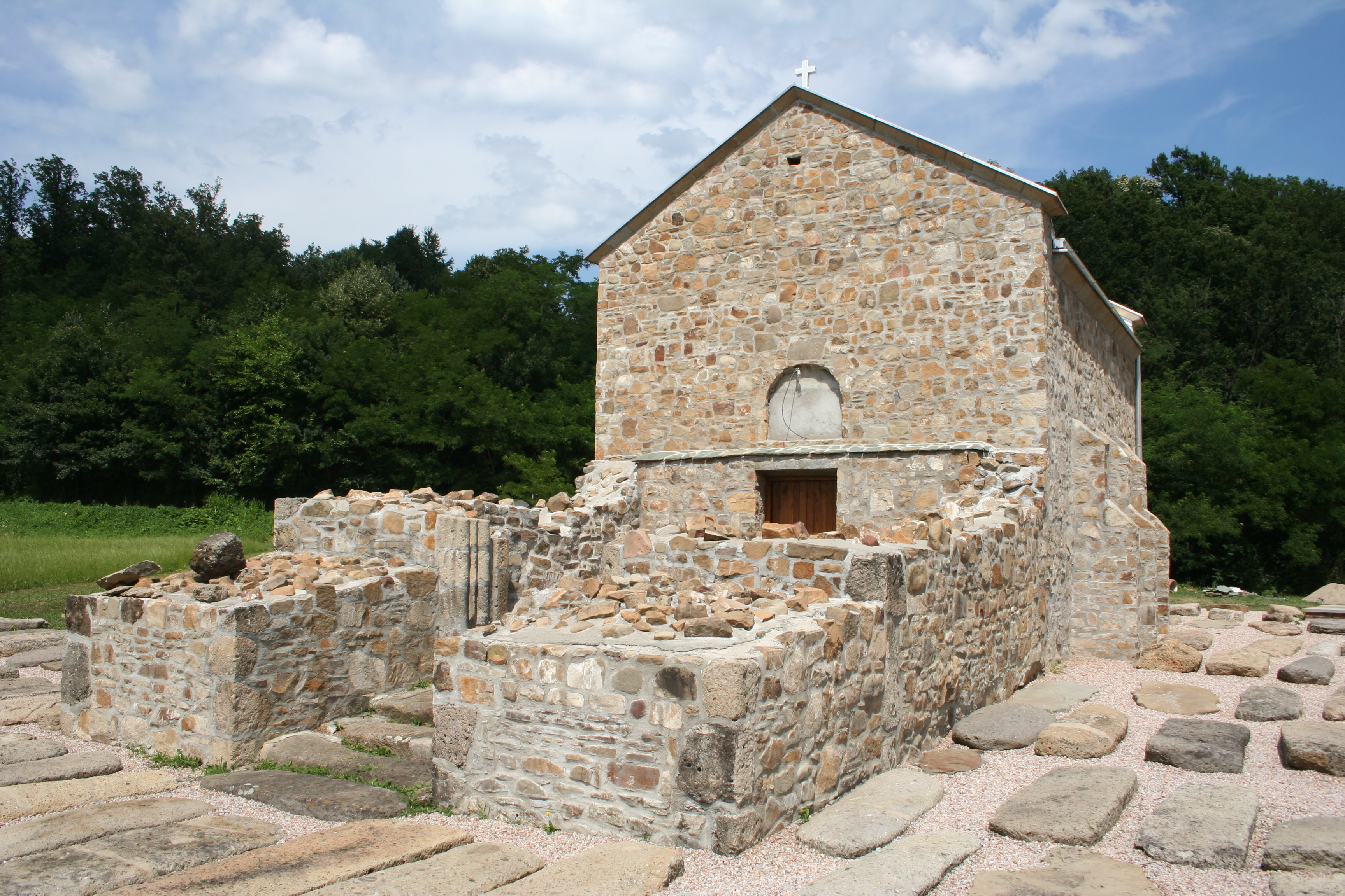 Ostaci srednjovekovne crkve i groblja u Dićima